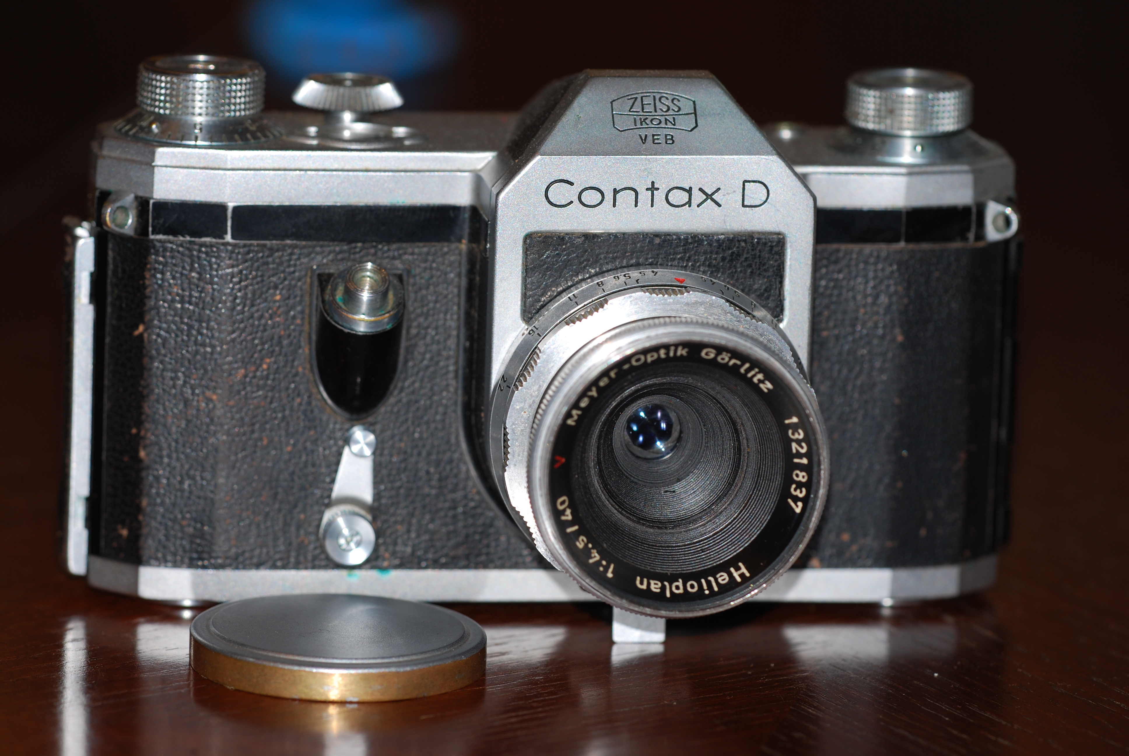 Фотоаппараты Zeiss Ikon